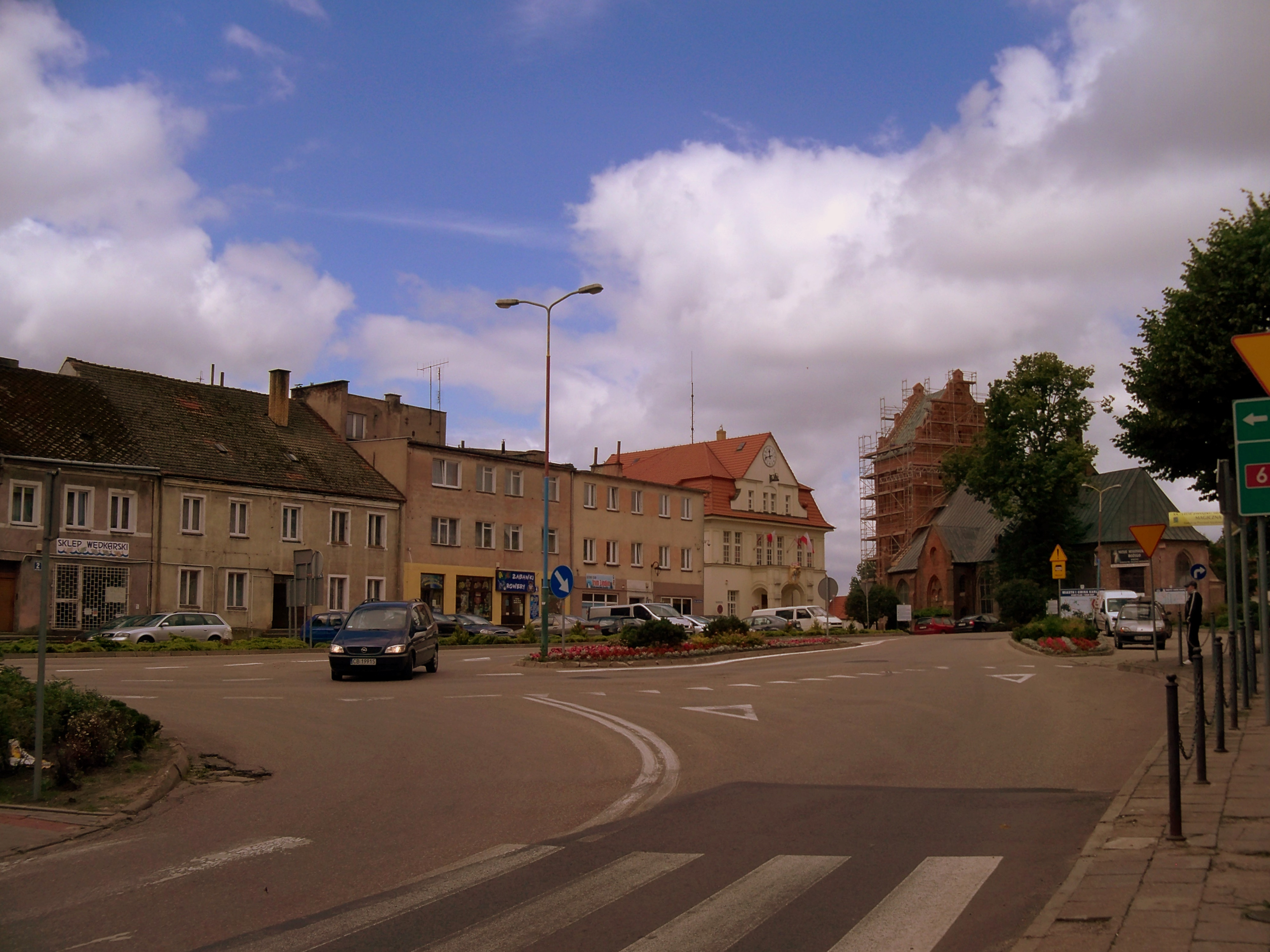 Karlino - Rynek wraz z kościołem